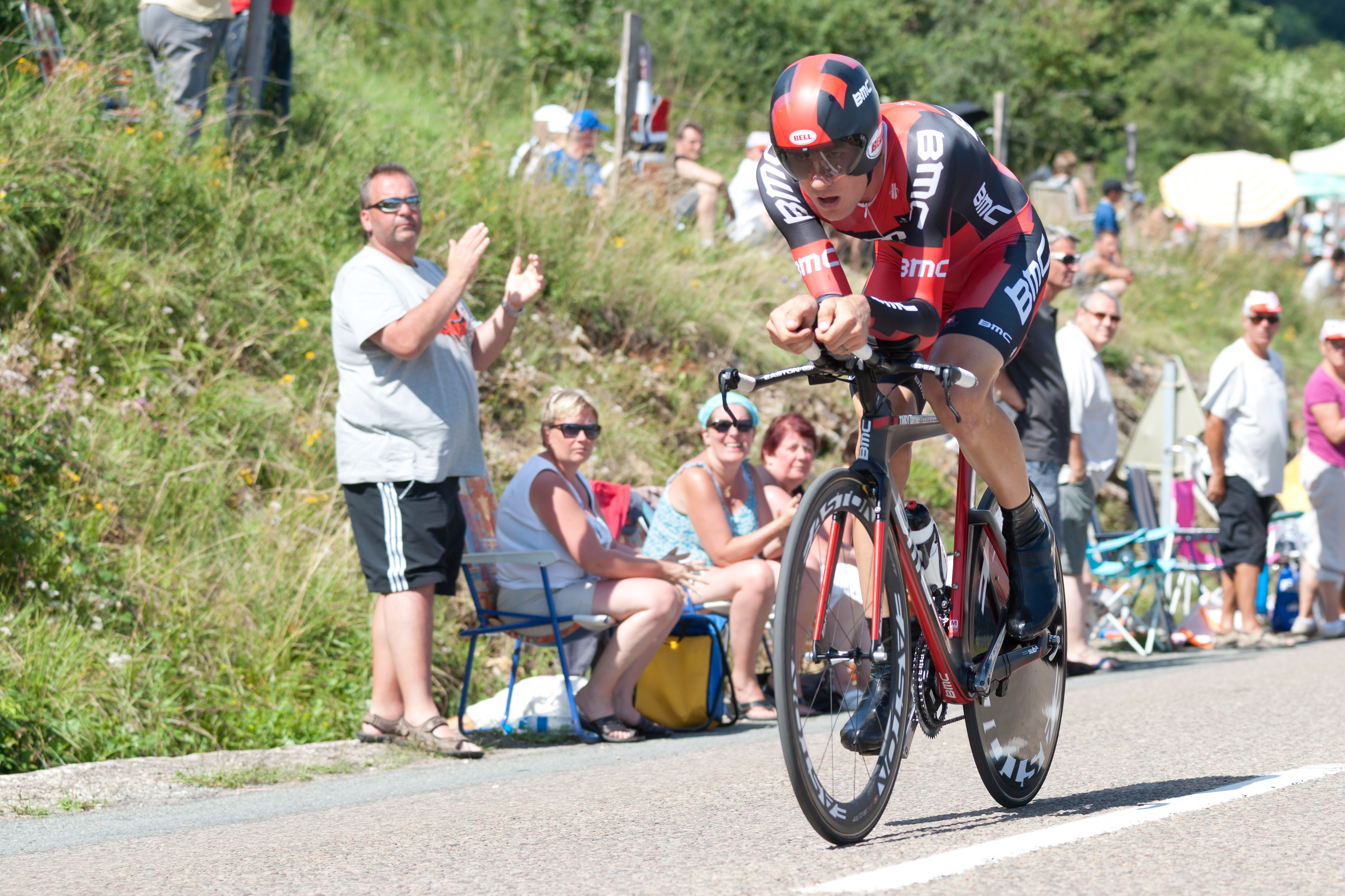 Tejay van Garderen - TDF 2012